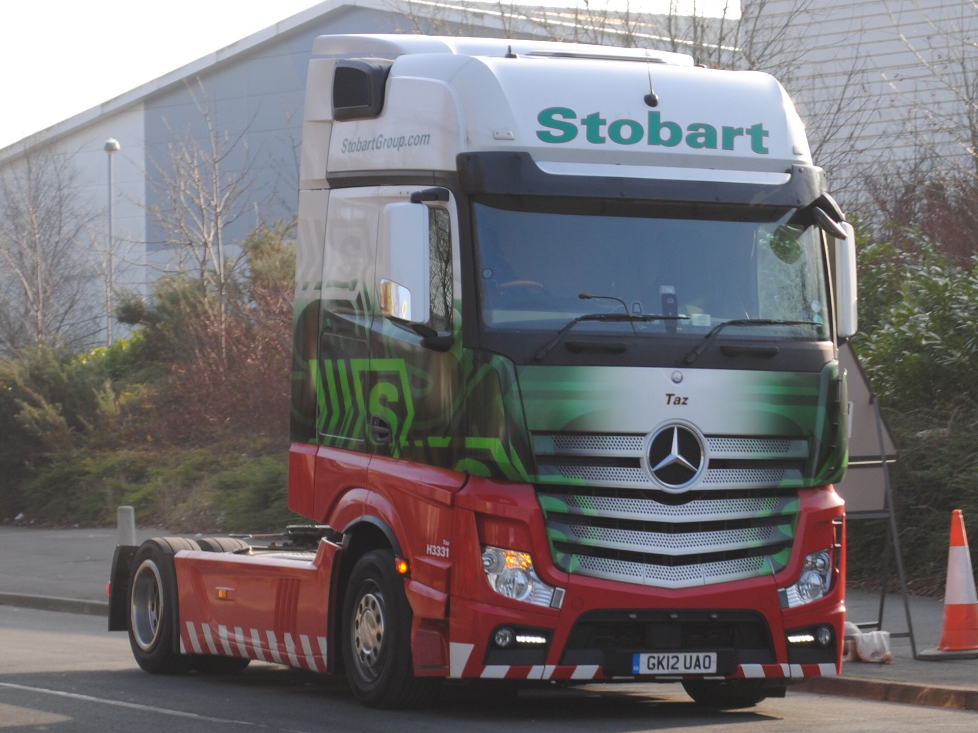 Mercedes-Benz MP4 Actros (H3331 Taz). seen here in Hawleys Lane depot, Warrington